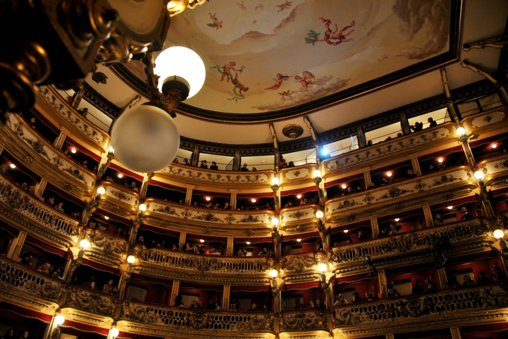 Interno del Teatro Bellini di Napoli.